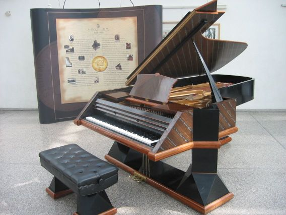 Steinway grand No.500.000